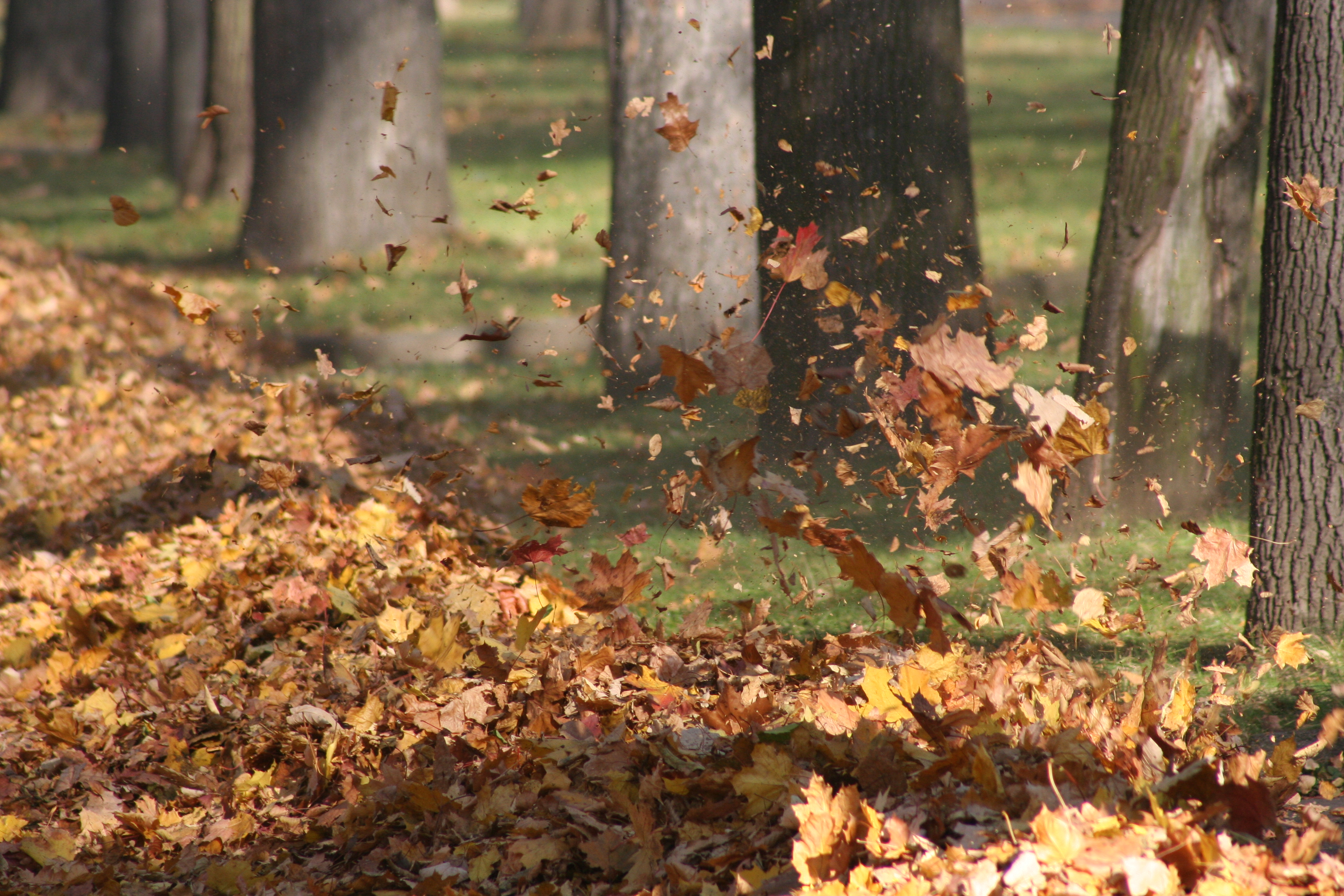 Autumn wind.